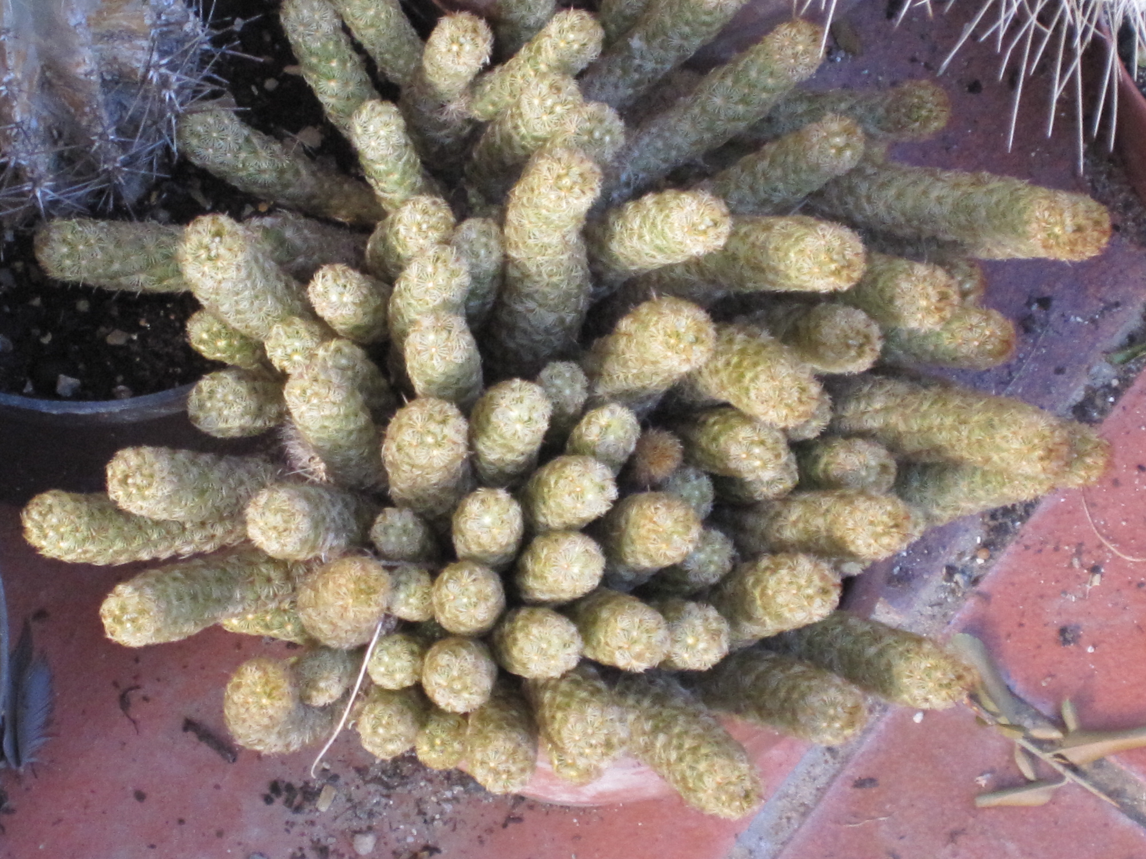 Mammillaria elongata